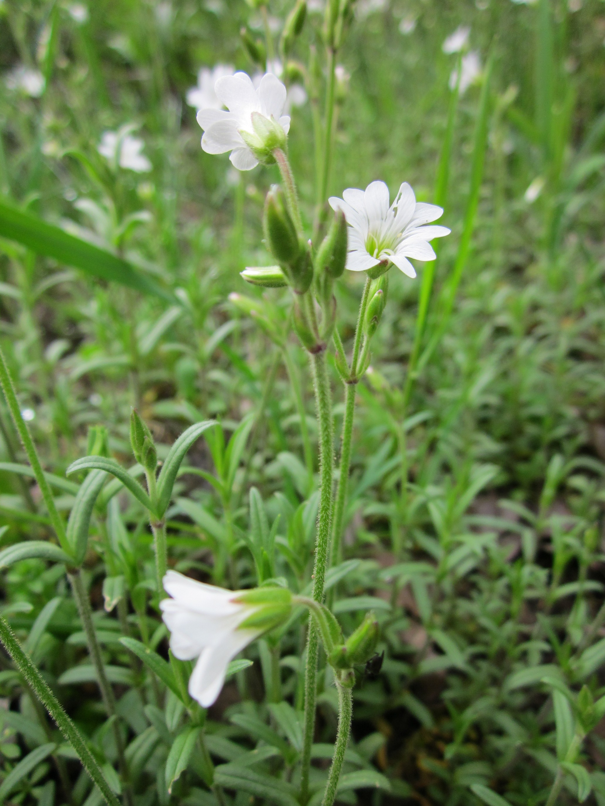 Acker-Hornkraut (Cerastium arvense) bei Neulußheim (Gemarkung Altlußheim)